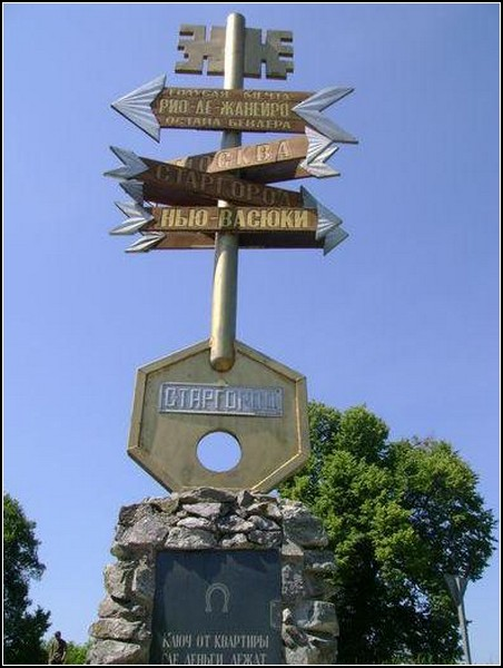 Памятник село Комаров Винницкого района